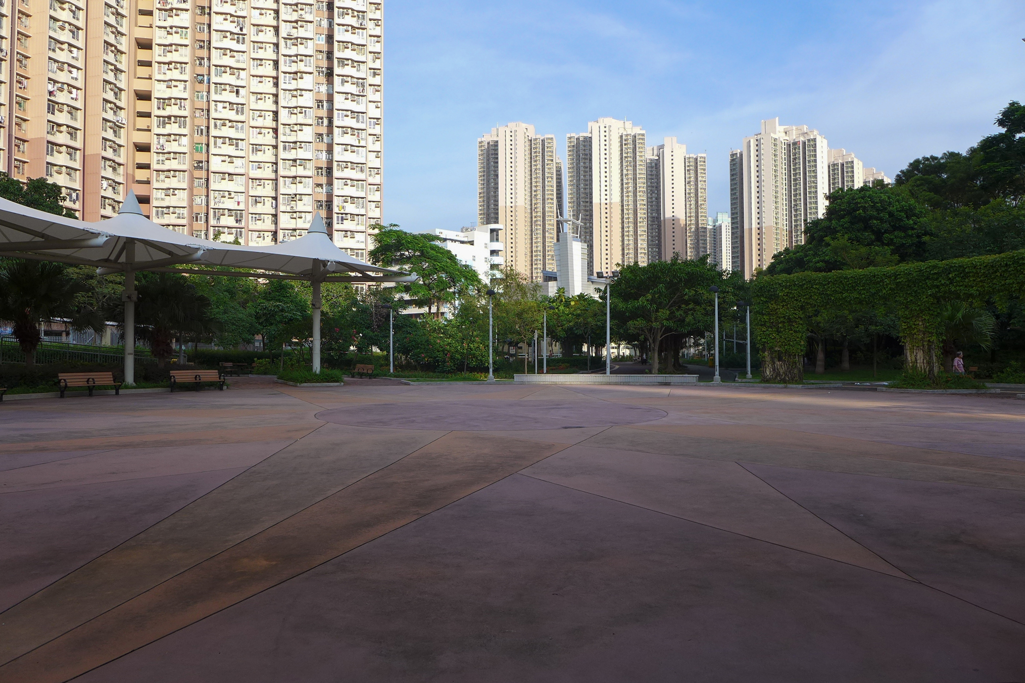 Sau Ming Road Park Open space